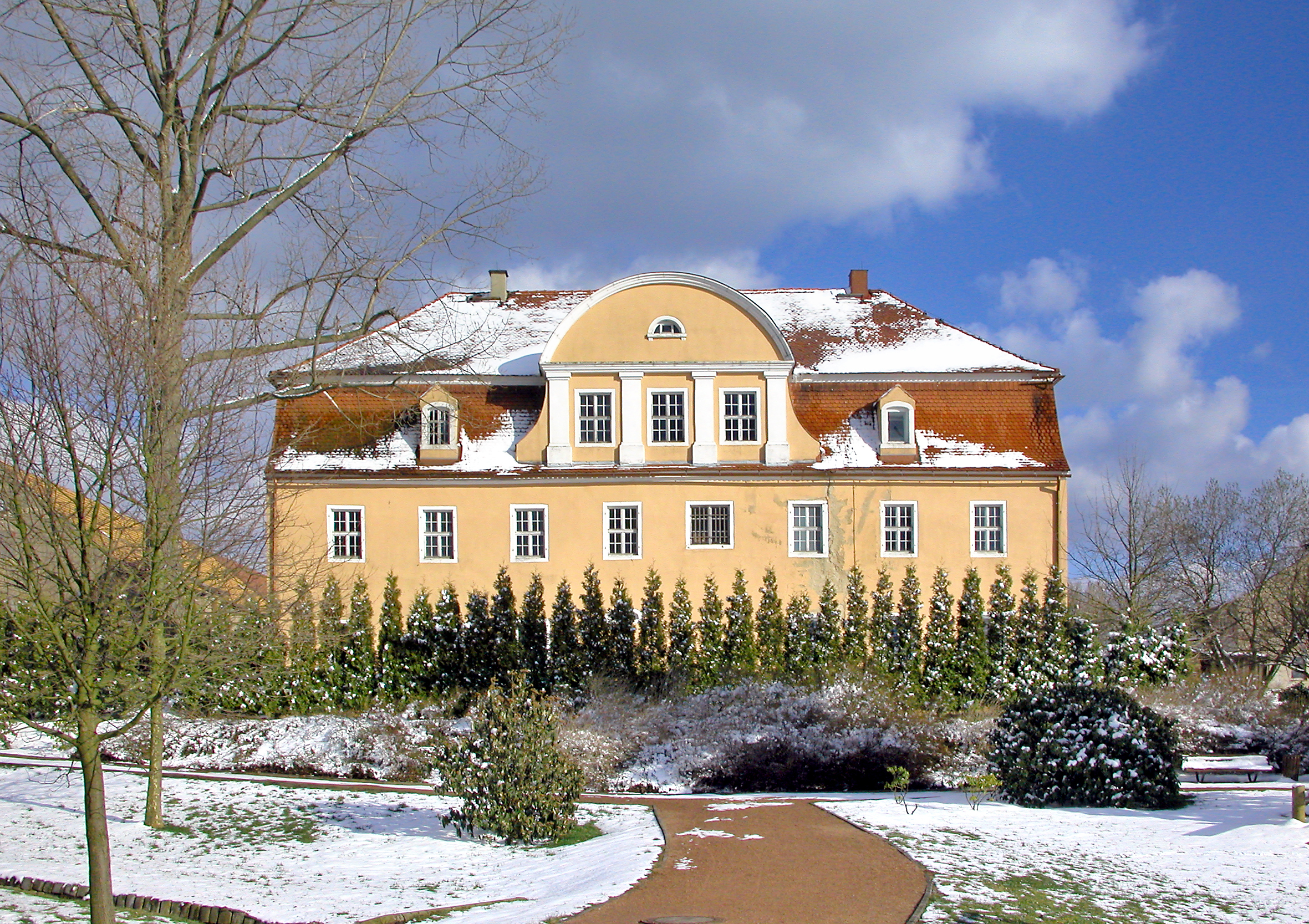 24.03.2008 01844 Krumhermsdorf (Neustadt in Sachsen), Hauptstraße 21a: Rittergut Krumhermsdorf. Das barocke Herrenhaus (GMP: 50.990839,14.202518) wurde Mitte des 18. Jahrhunderts errichtet, als Krumhermsdorf in der Hand des Wolf Siegfried Curt von Lüttichau war. 1912 kam das Rittergut an den Oberleutnant Georg Philippi aus Dresden. Erließ das Herrenhaus umgestalten, das Mansarddach erhielt Dachaufbauten. Nach 1945 und in der DDR-Zeit wurde das Gebäude als Kindergarten und Sitz der LPG genutzt. Seit der Zwangsversteigerung 2002 steht das Haus leer. Ansicht Straßenseite. [DSCN32053.TIF]20080324150DR.JPG(c)Blobelt